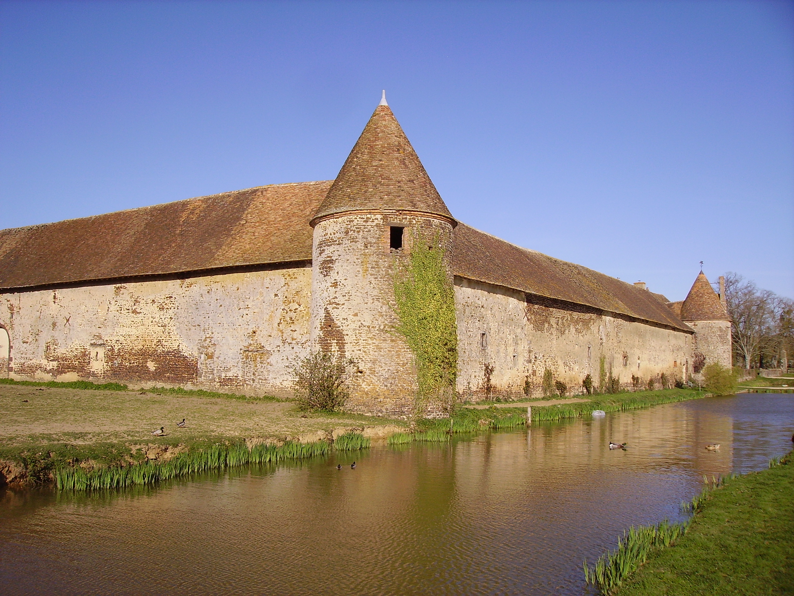 Château de la Vallée à Assigny (Cher) - communs.